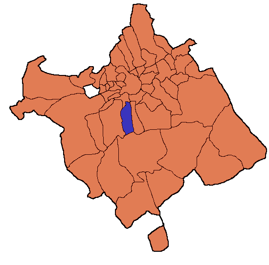 Hecho por mi